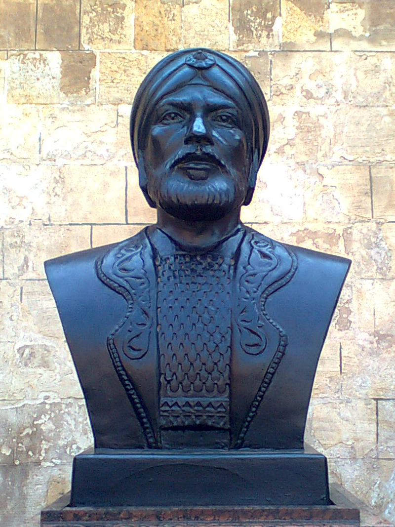 صورة لتمثال سيف الدين قطز من قلعة صلاح الدين في القاهرة